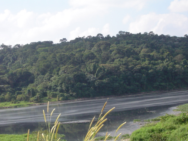 Poluição visível no Rio Tiete, município de Santana de Parnaíba.